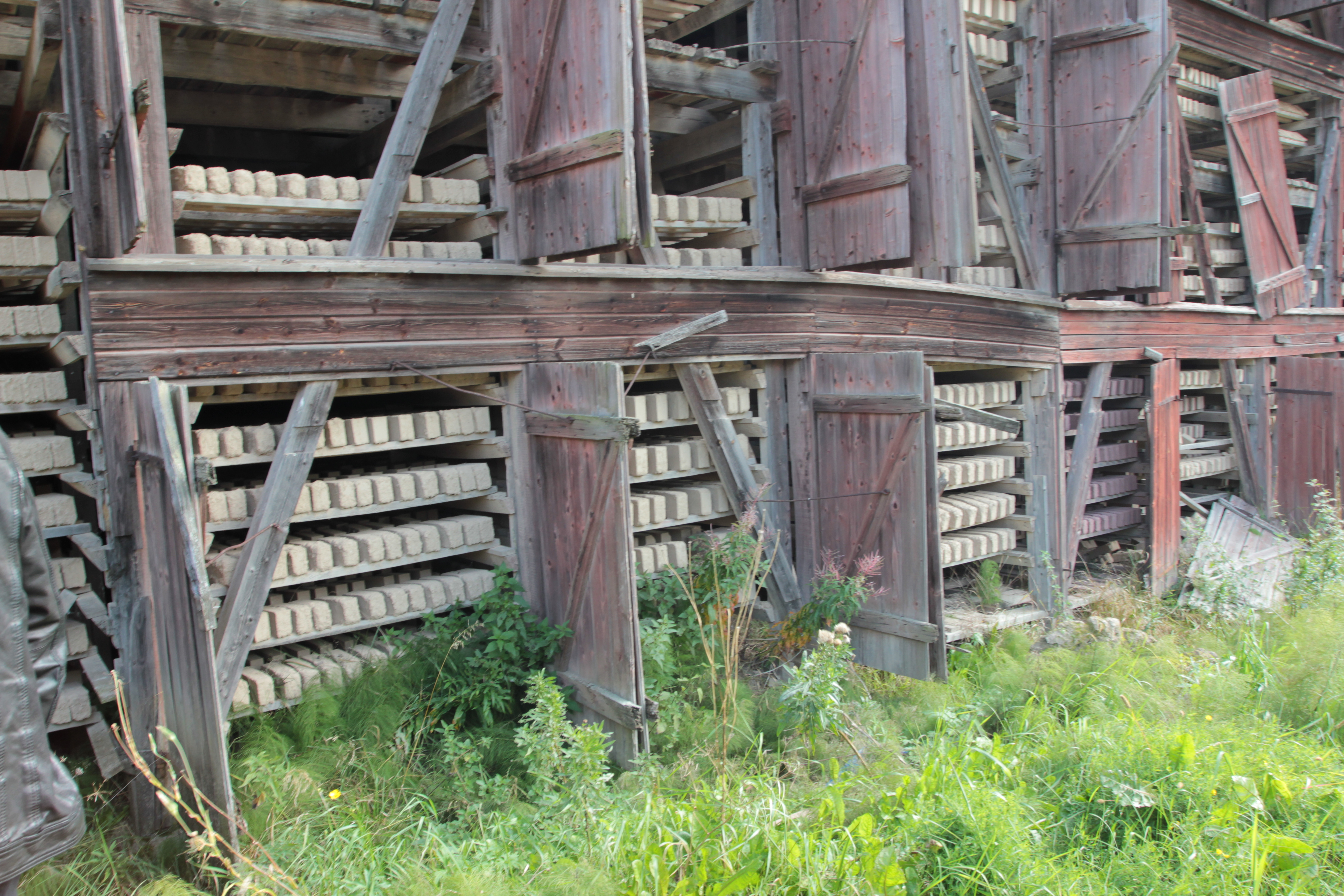 Bältarbo tegelbruk, årets industriminne 2000. Strax norr om Hedemora, Dalarnas län, Sverige